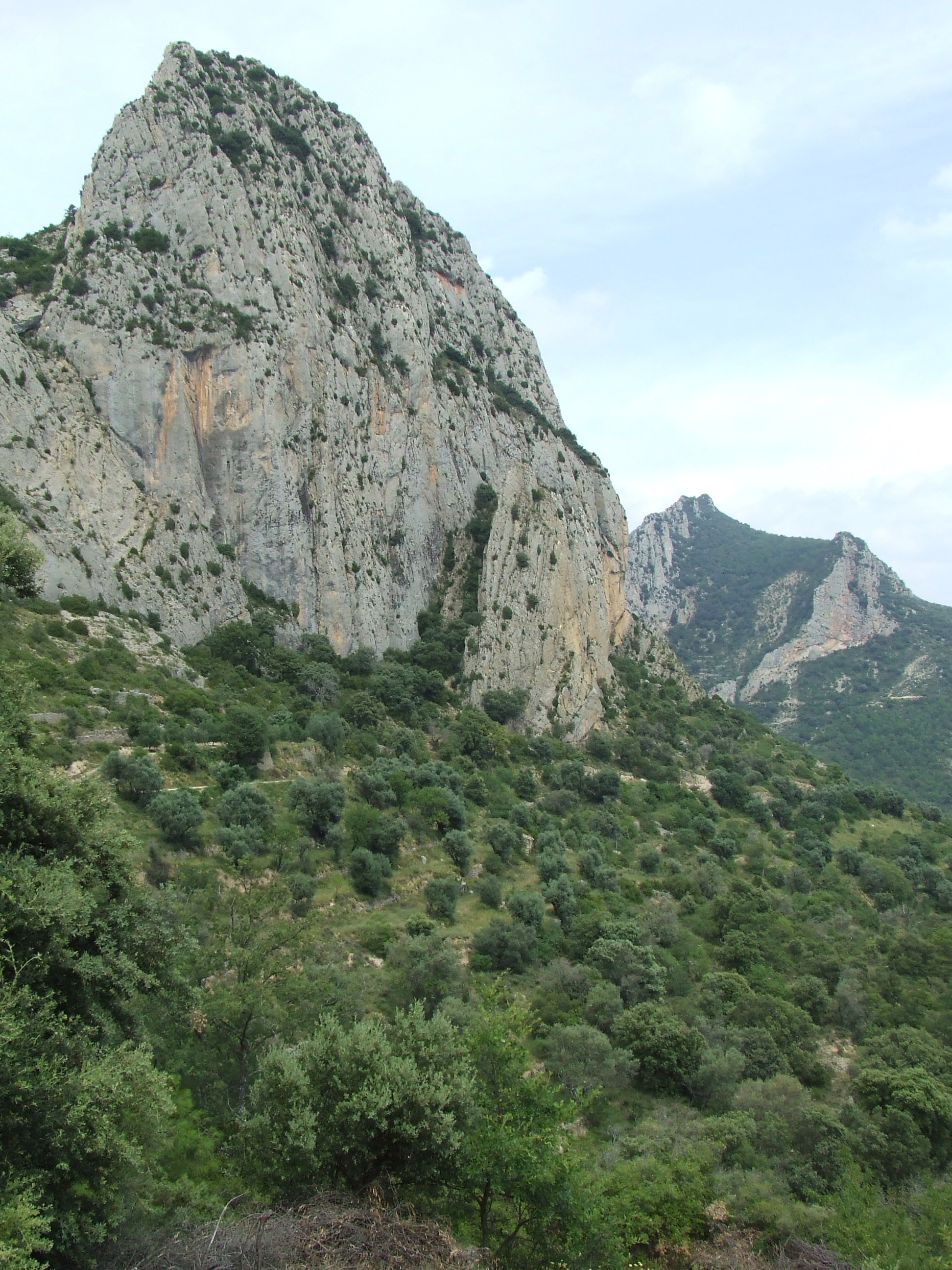 Roques de Magaró (Abella de la Conca, Pallars Jussà)